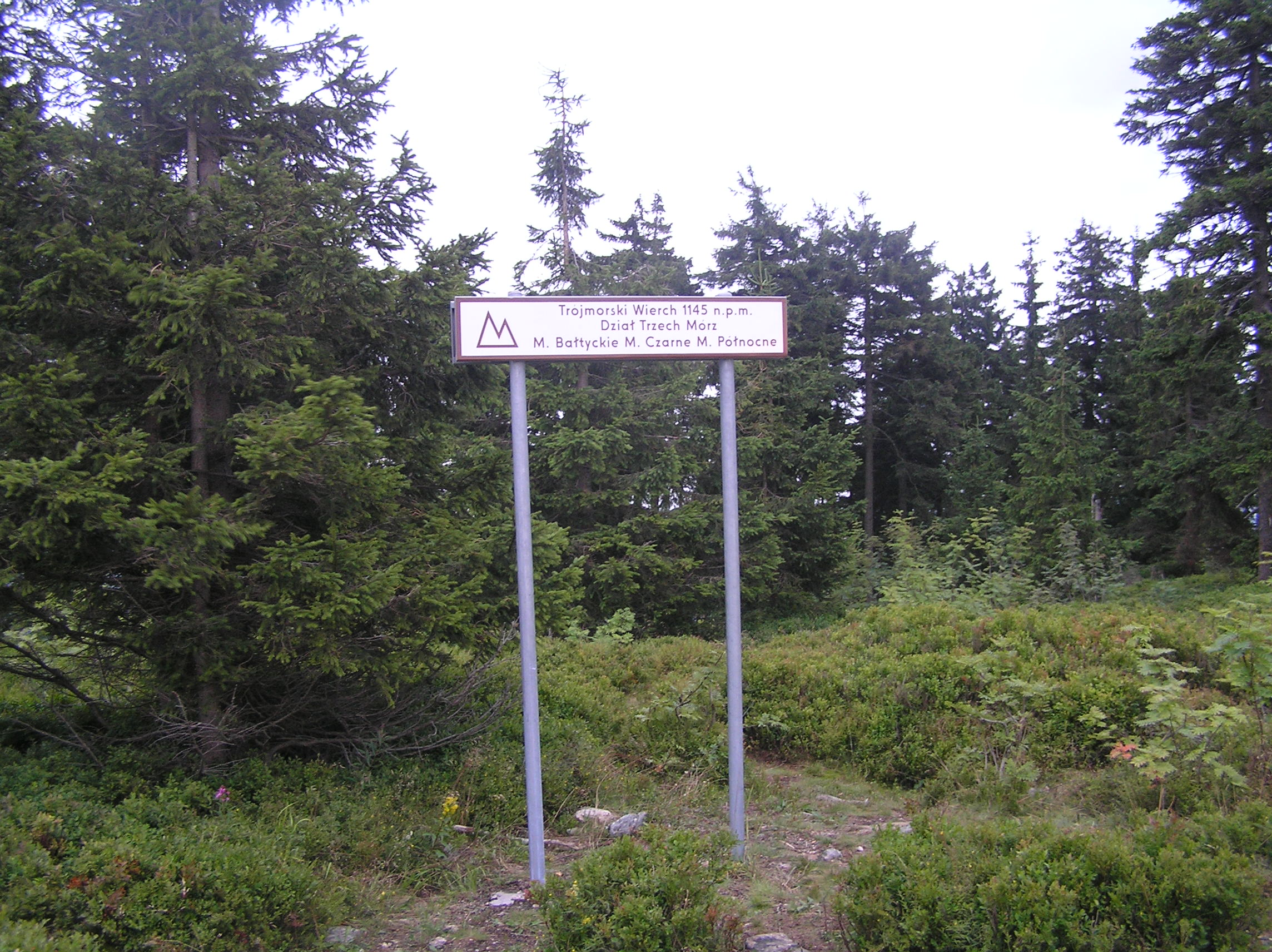 Klepý (1145 m), the Králický Sněžník Mountains, Poland and Czech Republic